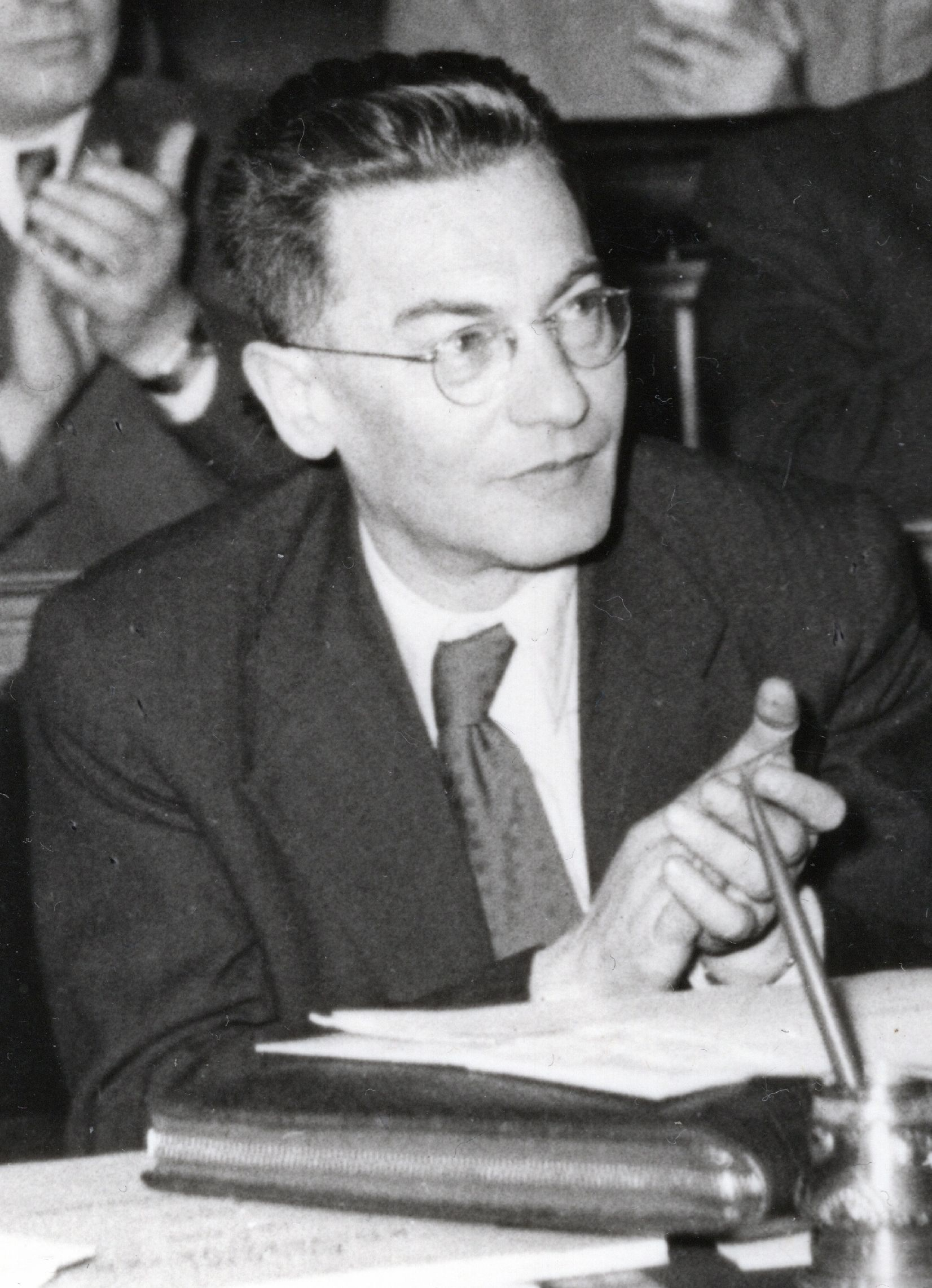 Révai József író és kultúrpolitikus a parlamentben